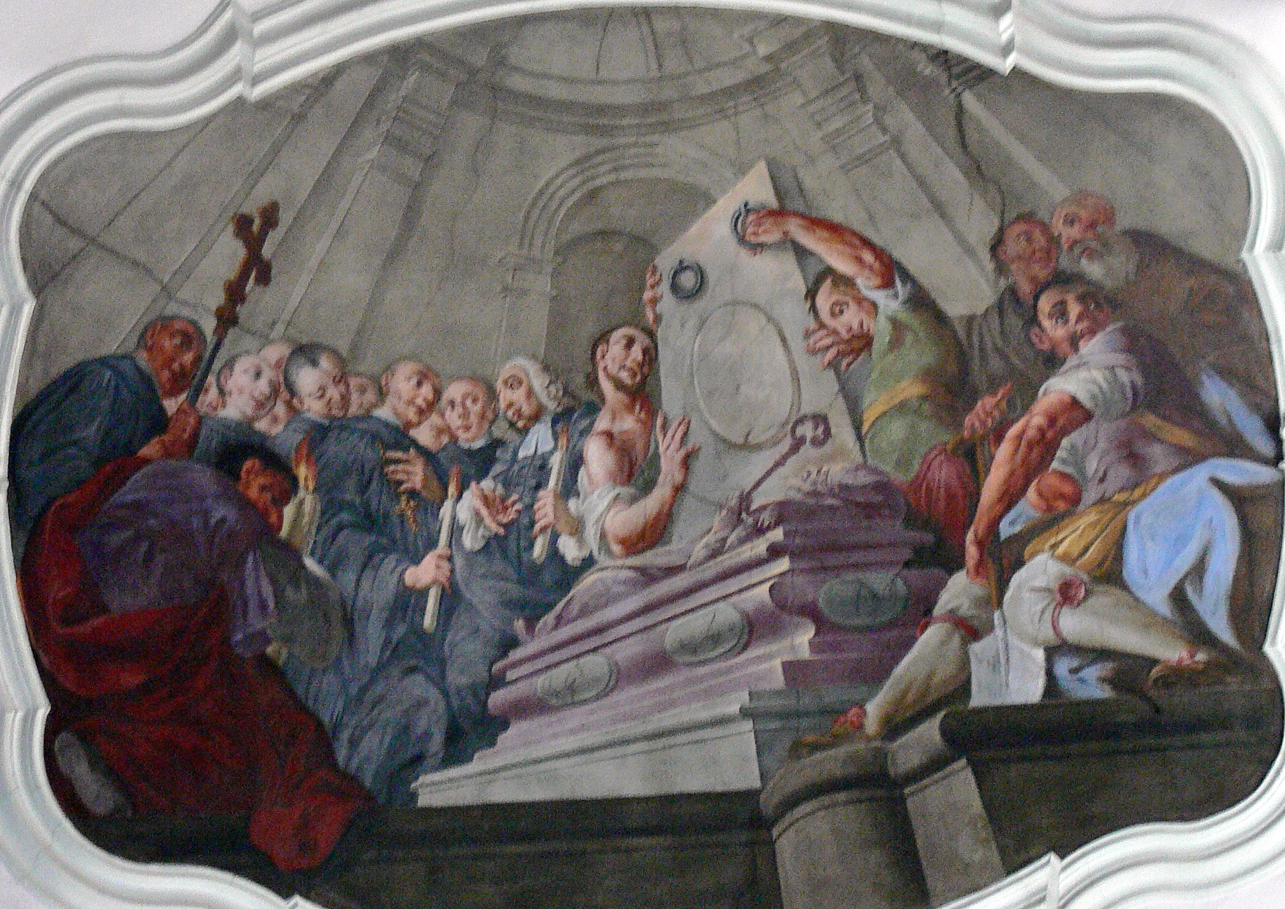 Salzburg, Stiftskirche St. Peter, Fresko, Aufdeckung des Grabs des hl. Amandus